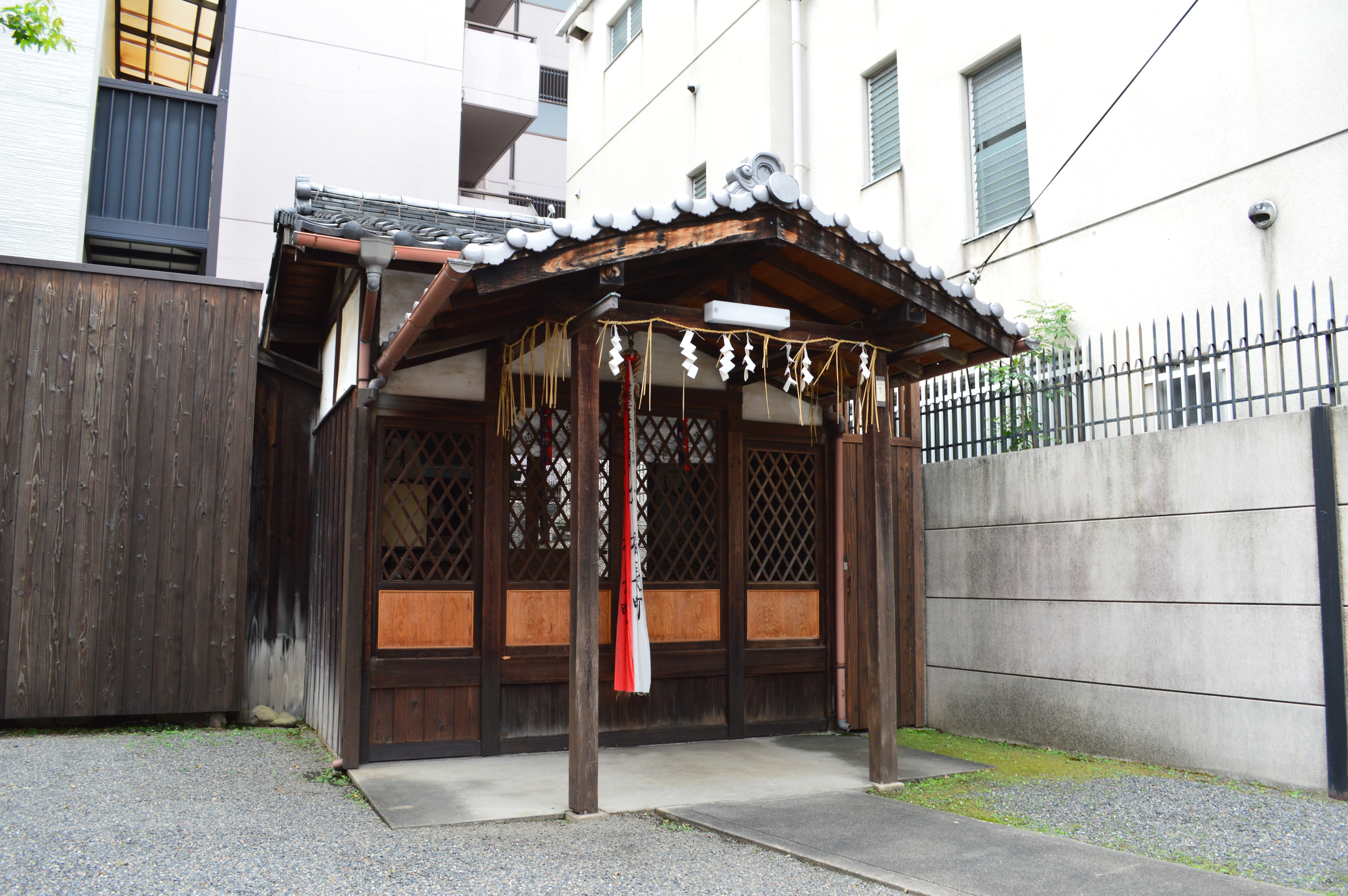 福長神社 社殿